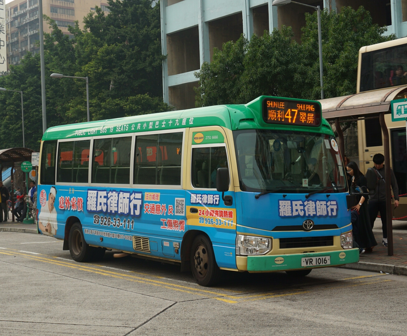 中文（香港）: 九龍區專線小巴47線，剛到達觀塘站